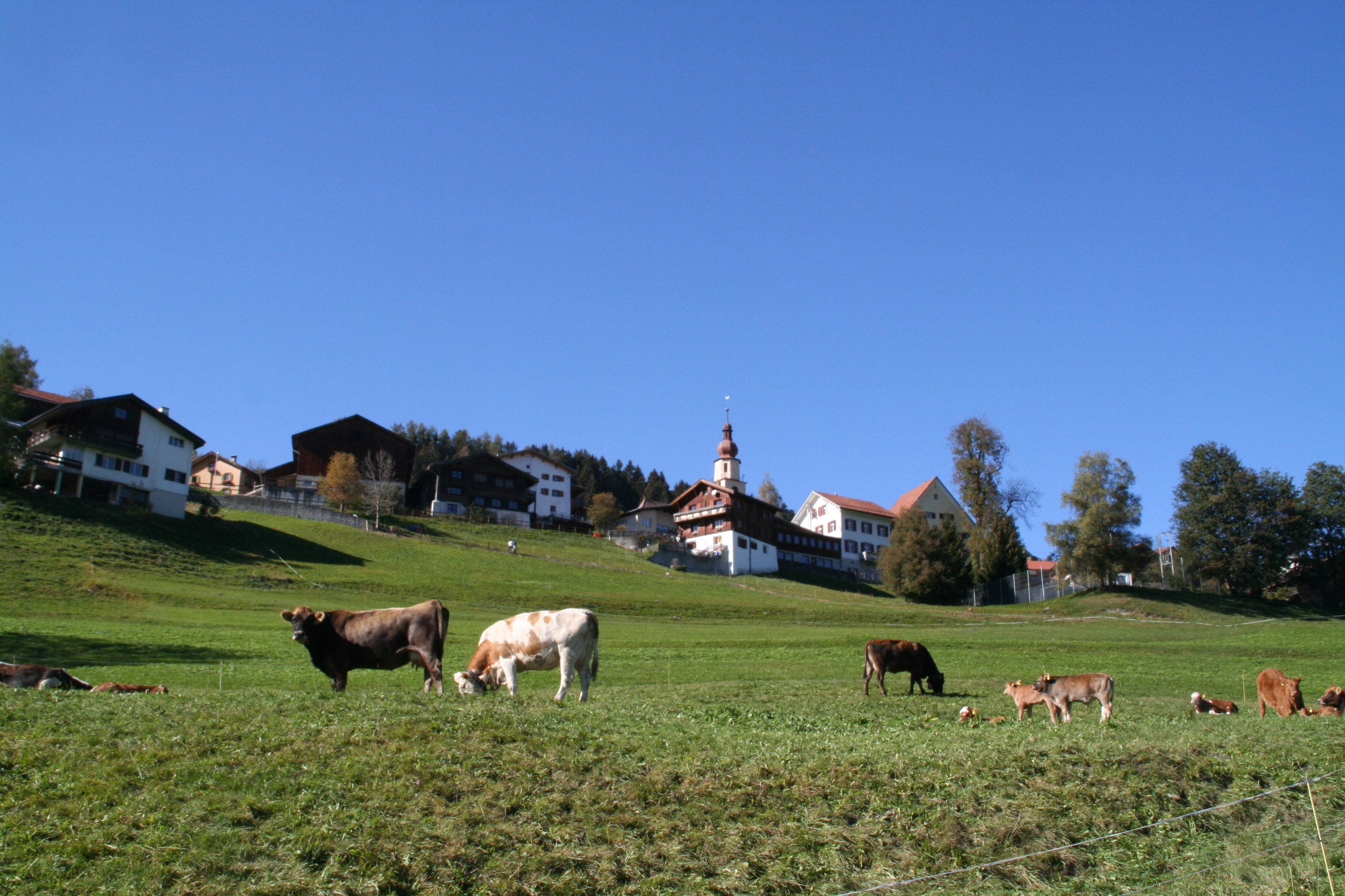 Sarn